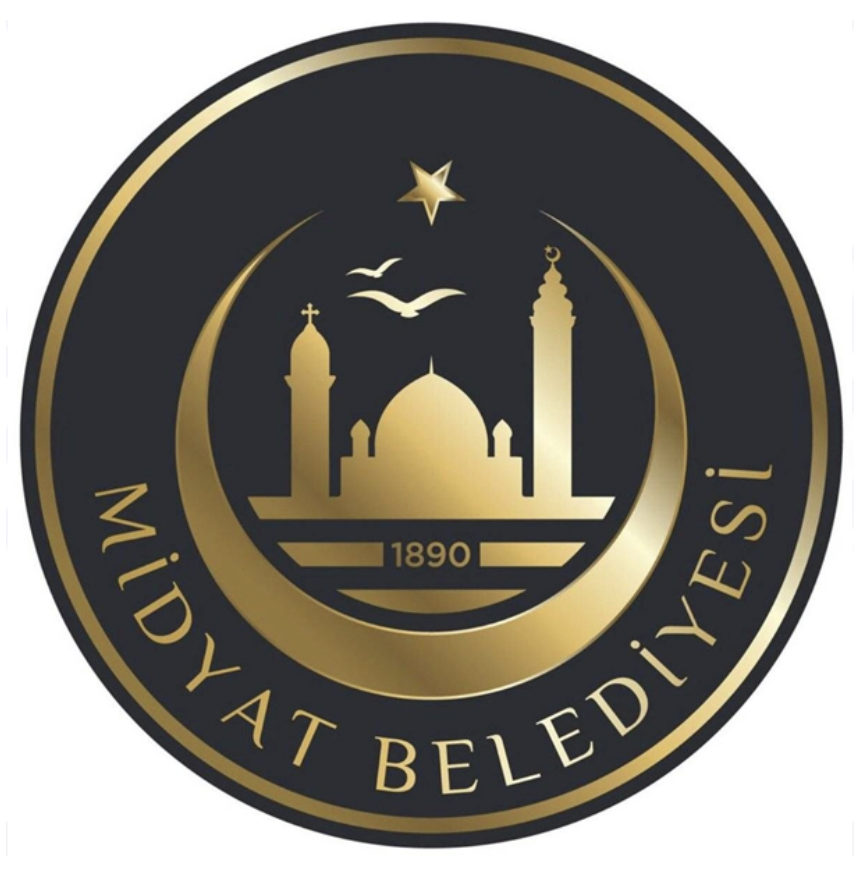 Wappen der türkischen Stadt Midyat vom 05. März bis 22. Juli 2019.